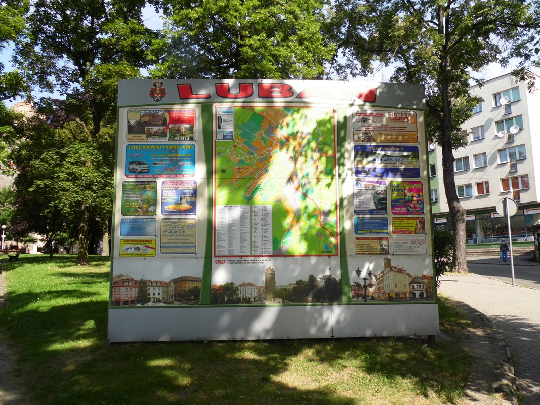 Plan Lubania w woj.dolnośląskim.